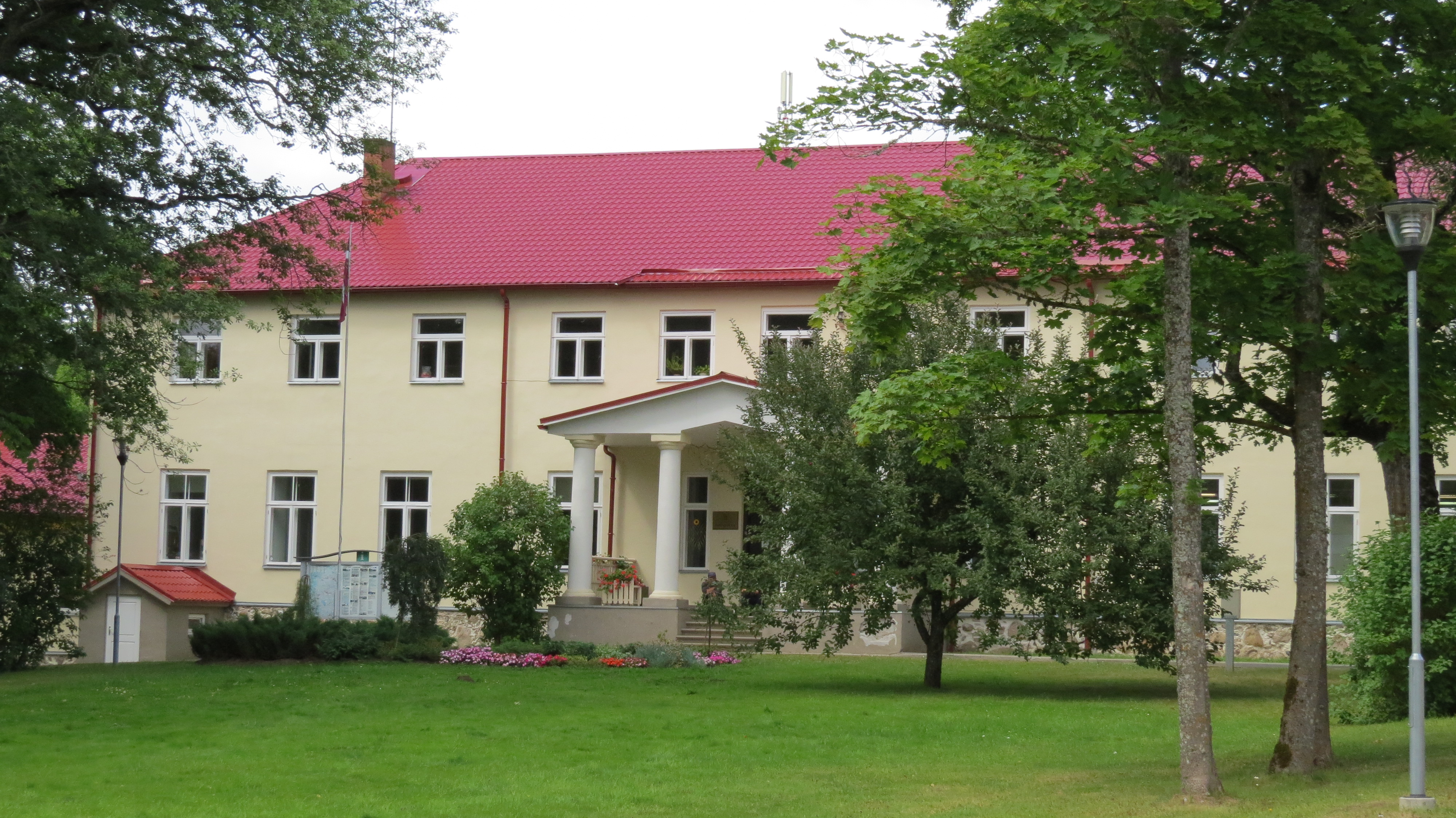 Sēļi mõisa peahoone (2) 2013. aastal.